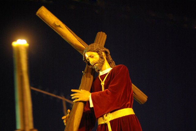 Nuestro Padre Jesús de Pasión Fotografía de José Ramón Martínez